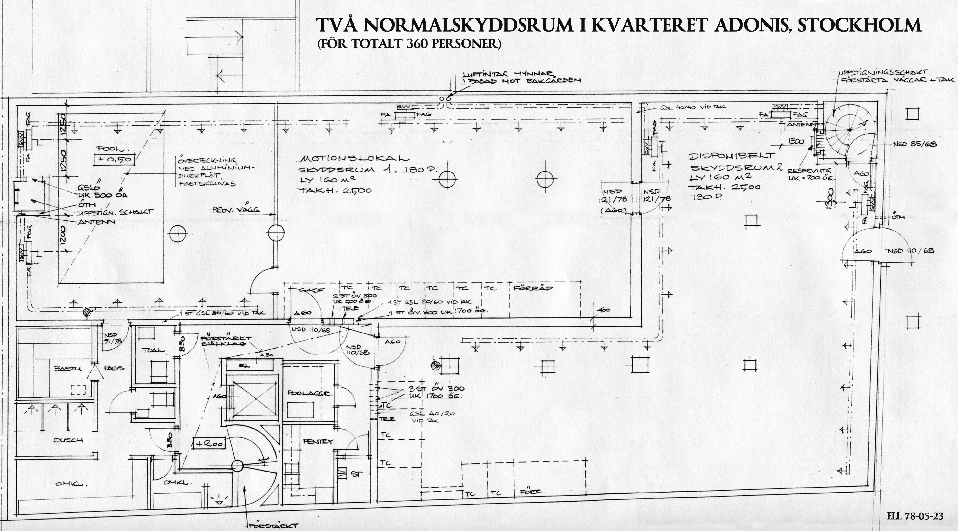 Två normalskyddsrum i kvarteret Adonis (Sveavägen) i Stockholm